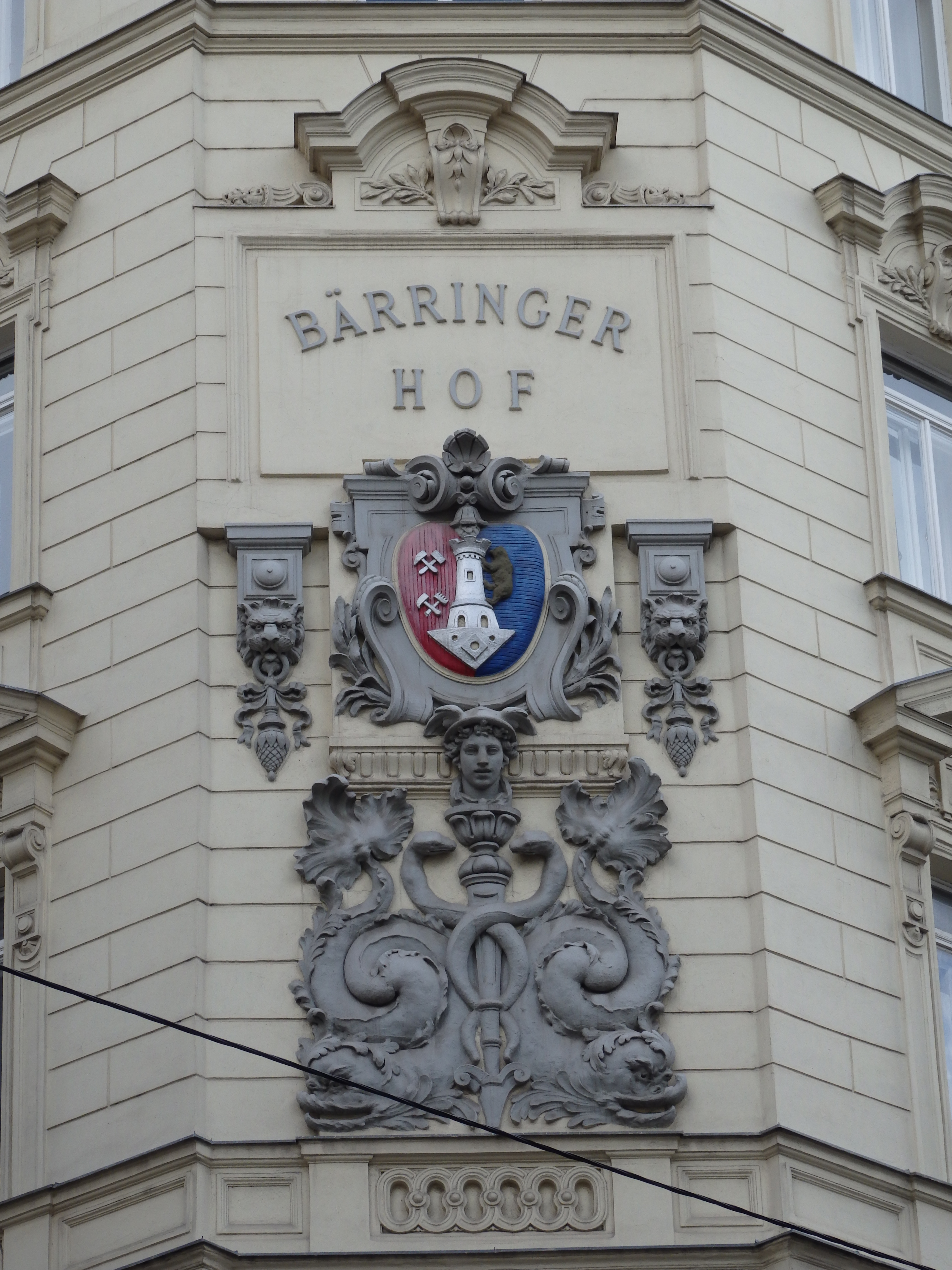 Bärringer-Hof, Detail, Fischerstiege 9, Wien-Innere Stadt